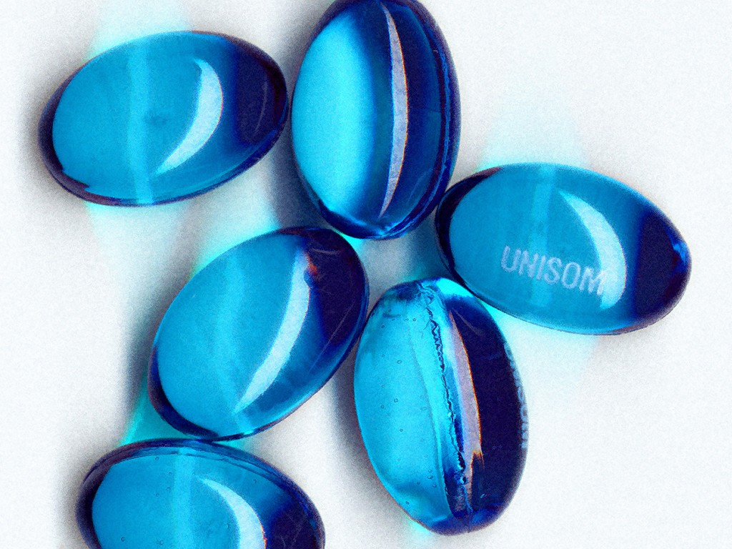 Pfizer's Unisom Diphenhydramine pills